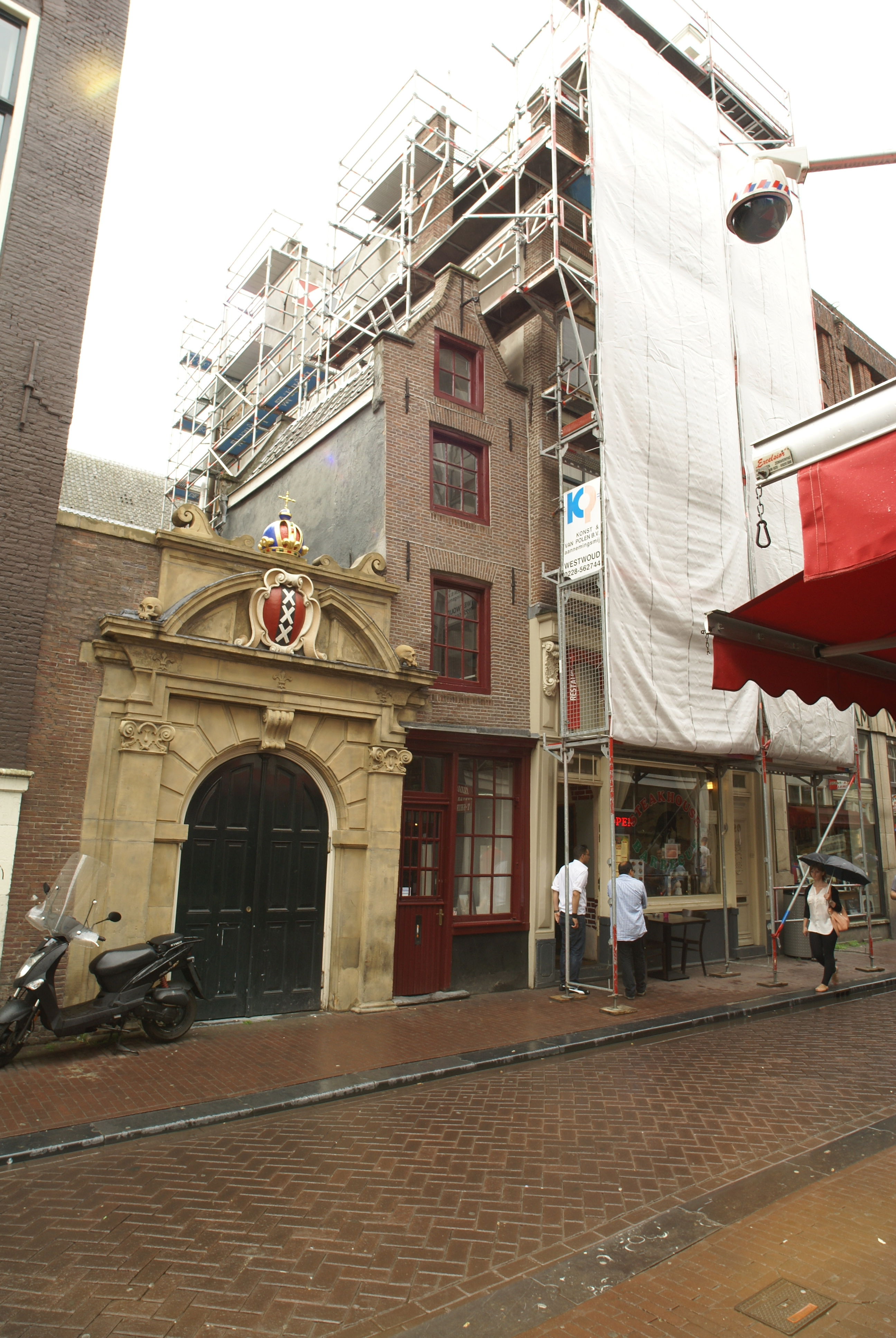 Een huisje van 2,02 meter breed en 5 meter. Gebouwd in 1738.